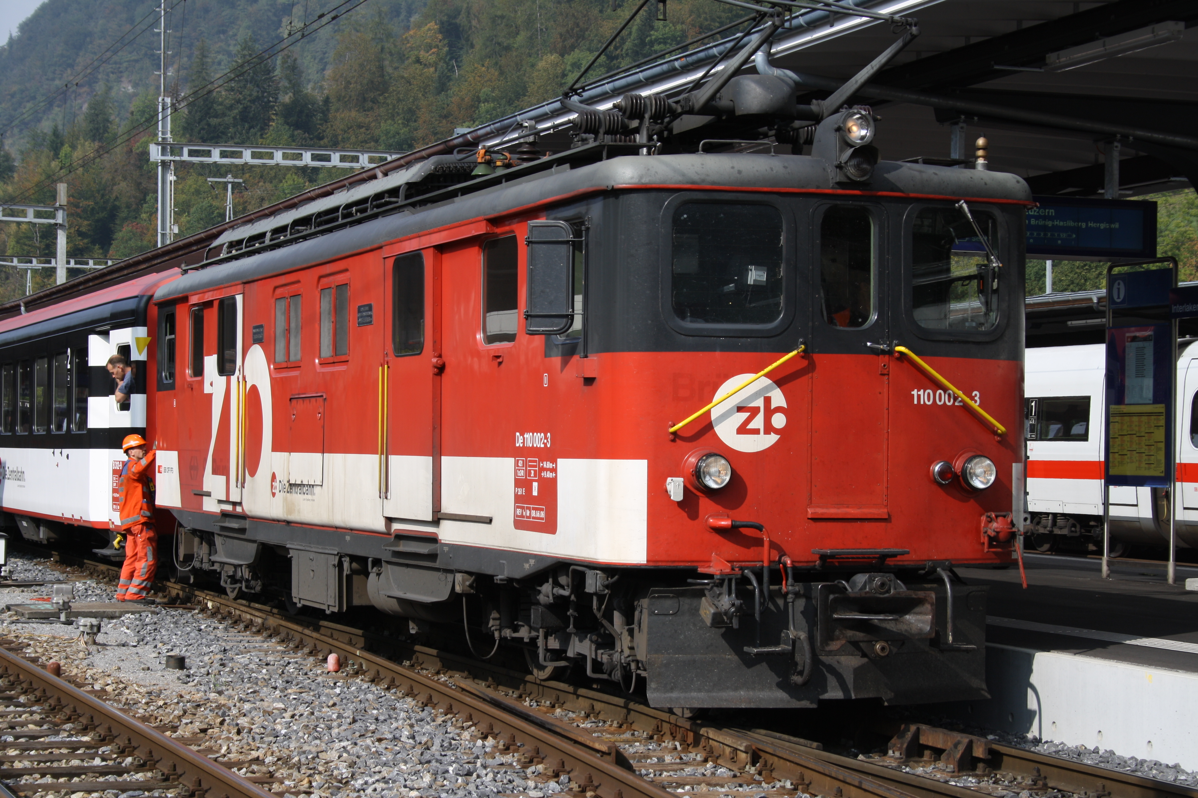 110 002-4 in Interlaken Ost